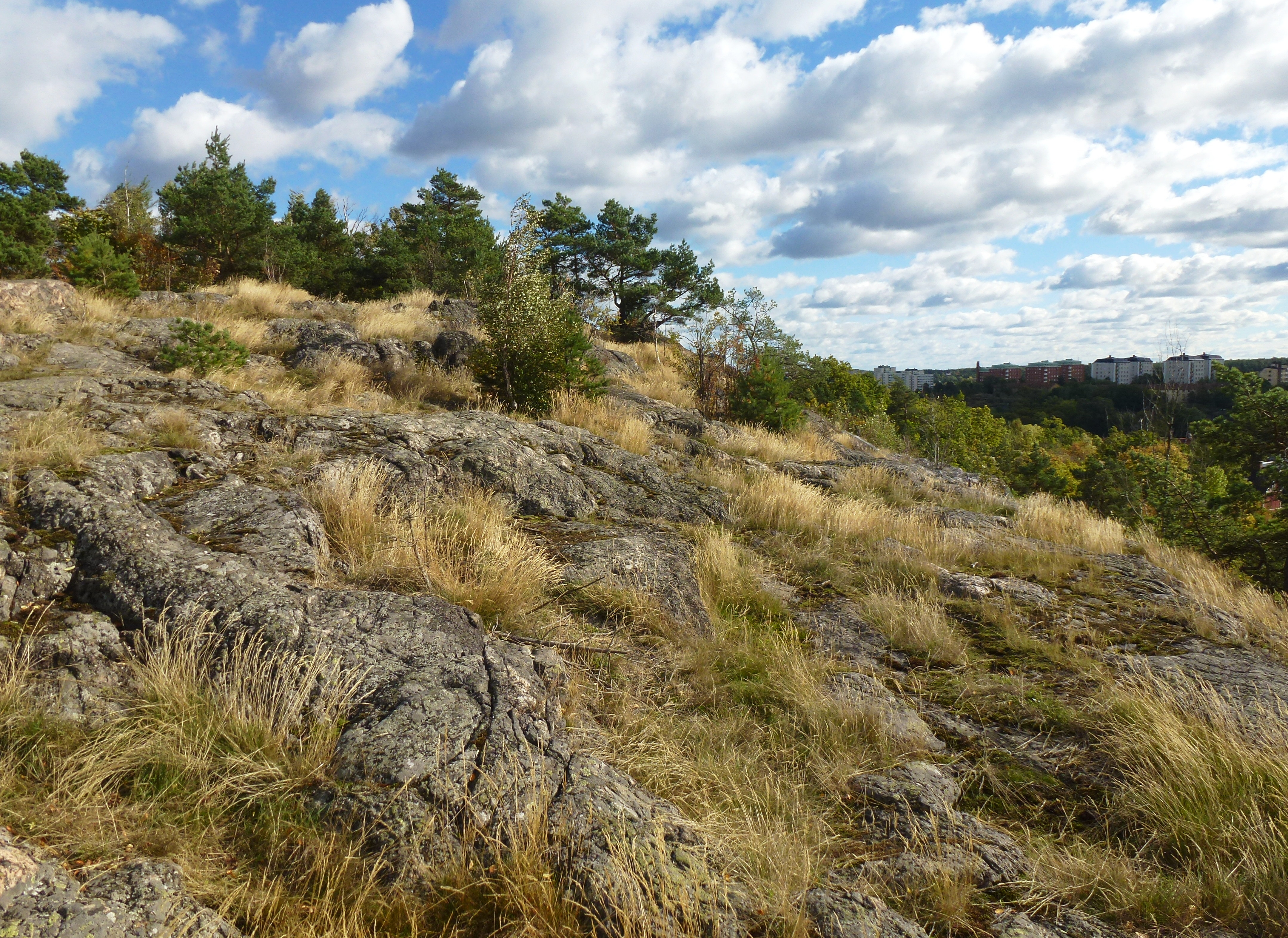 Finnberget Nacka